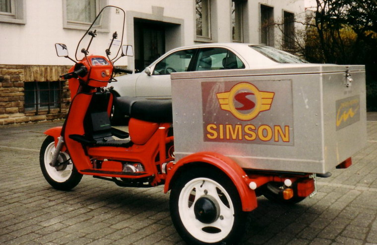 2 Erwachsene+1 Kind bis 6 Jahre und/oder 25 Kilogramm+360 Liter KOFFERraum